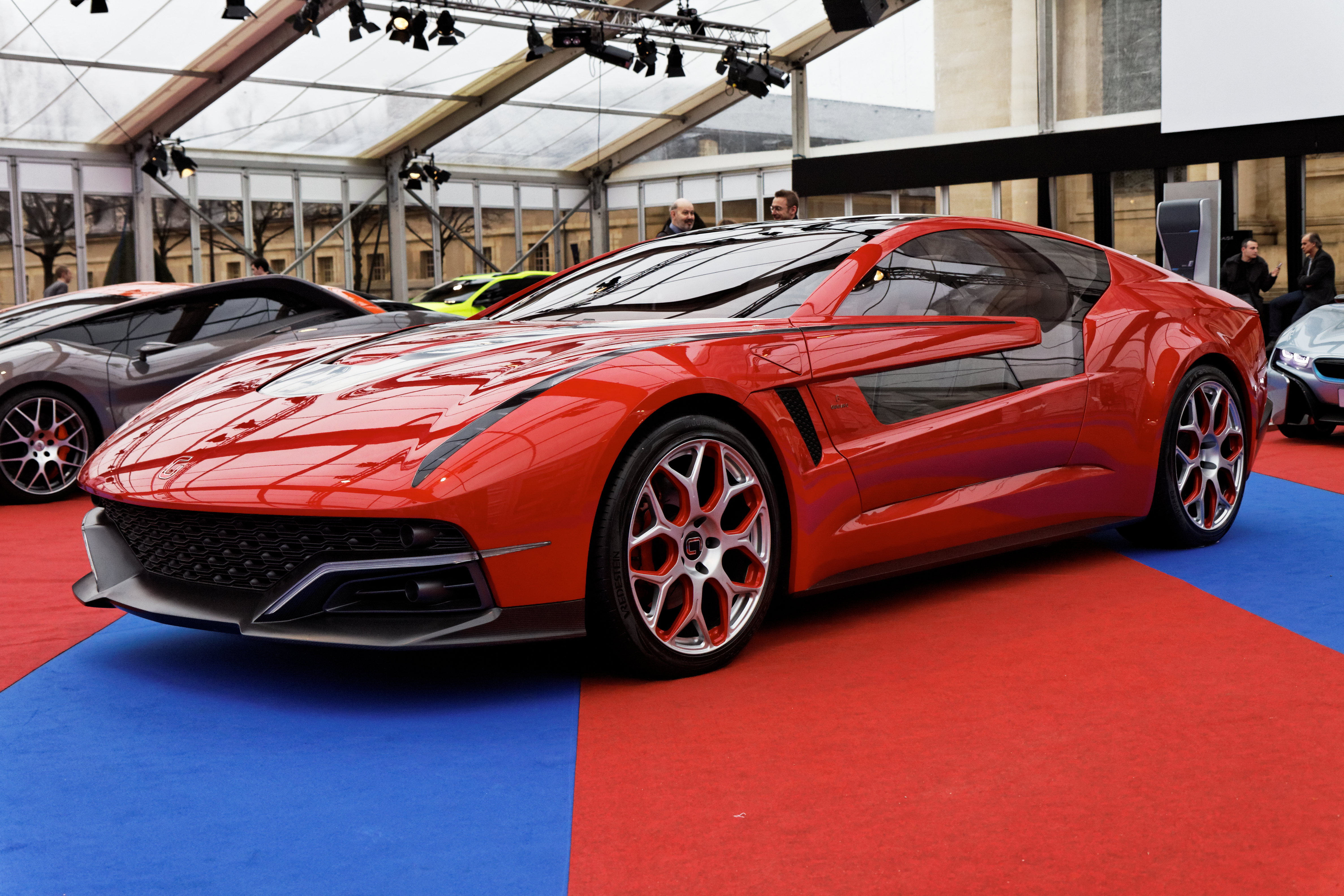 Une Giugiaro Brivido Concept exposée lors du festival automobile international 2013.